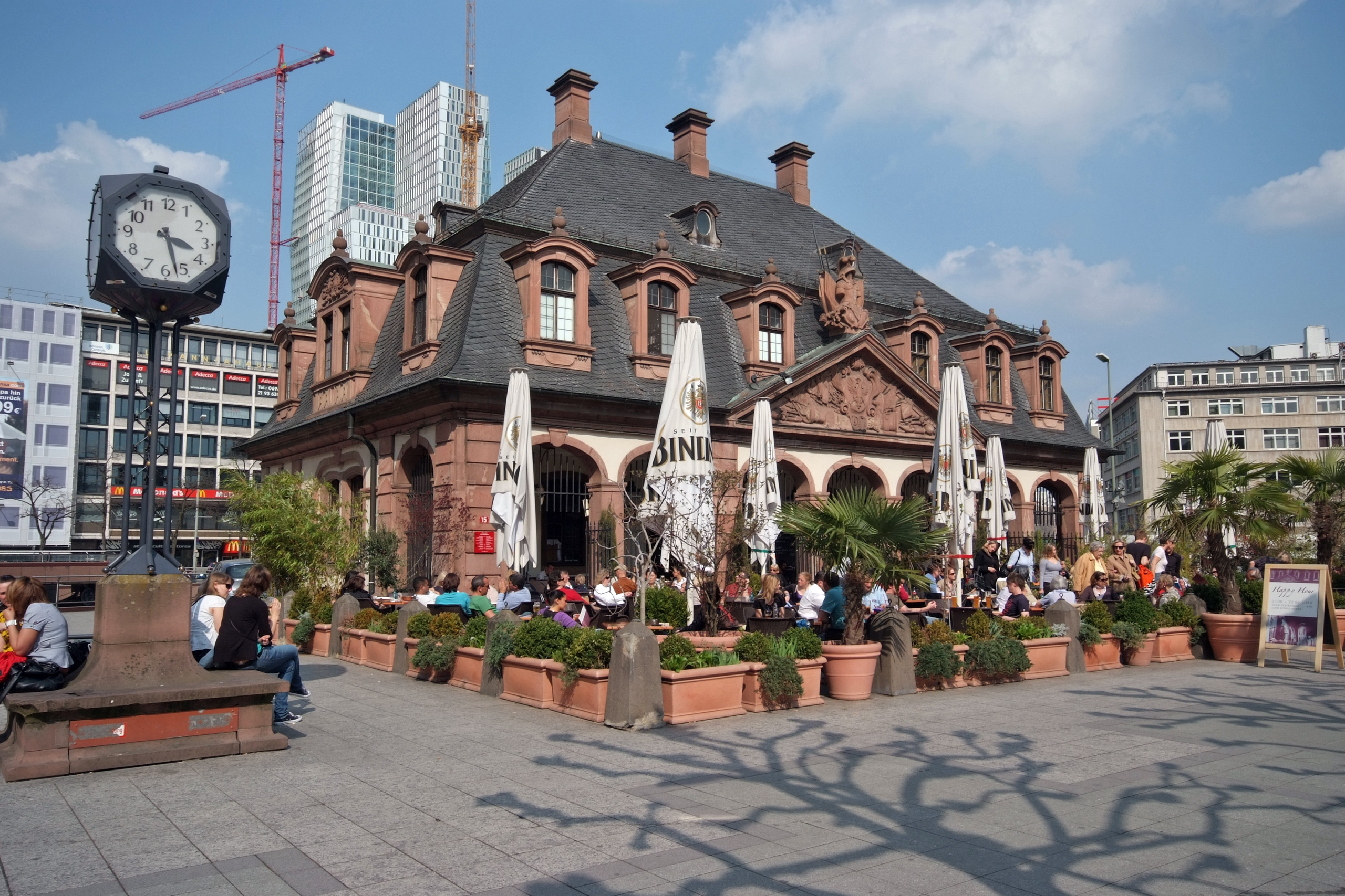 Hauptwachengebäude mit Café in Frankfurt am Main